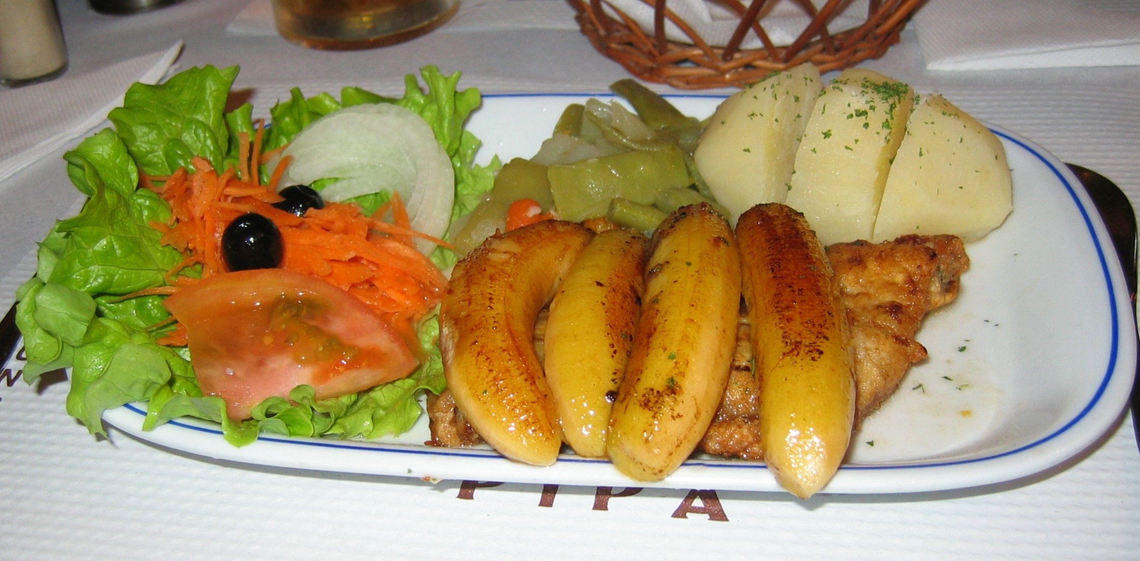 Espada with Bananas